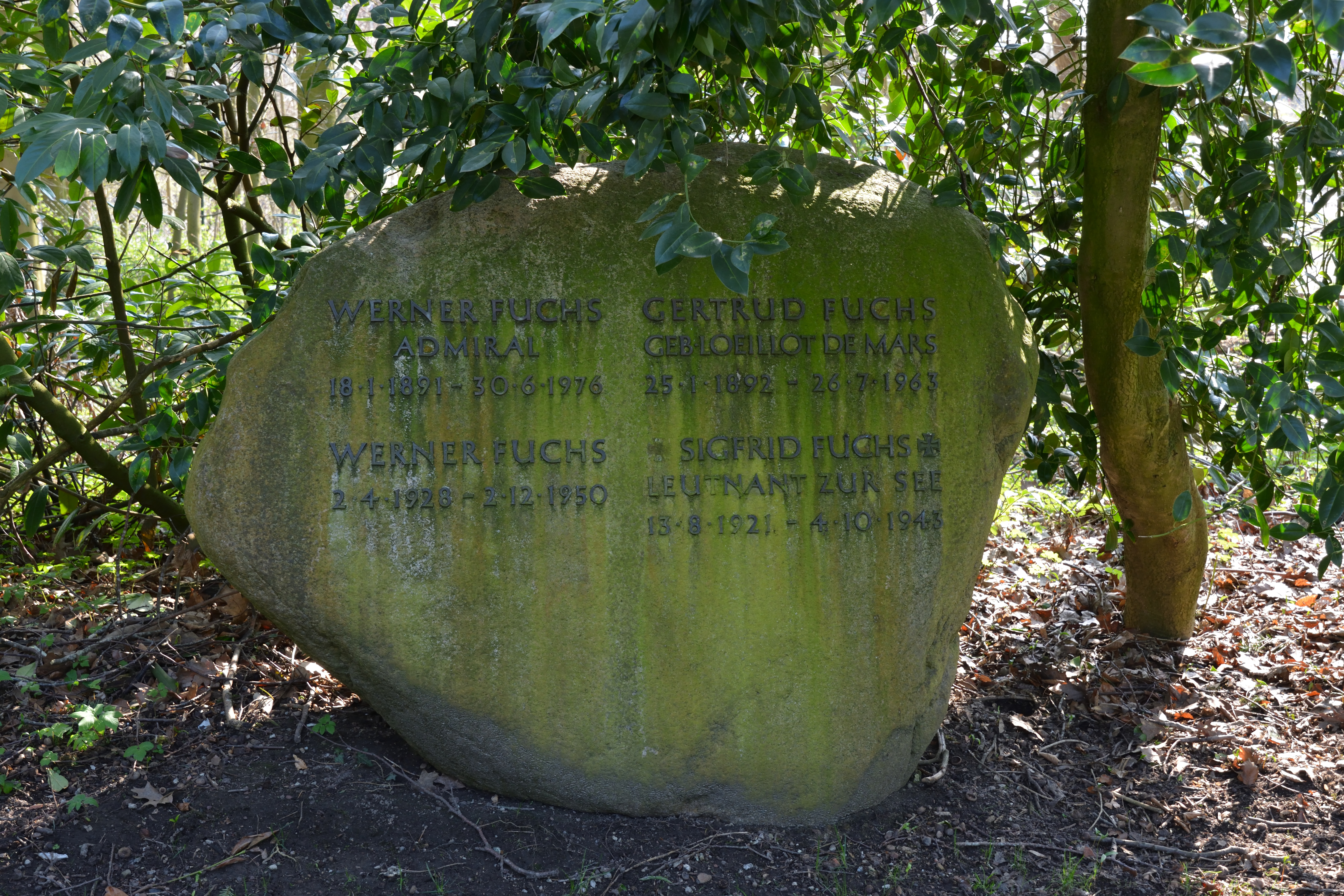 Impressionen vom Nordfriedhof in Kiel: Grab von Werner Fuchs (Admiral)